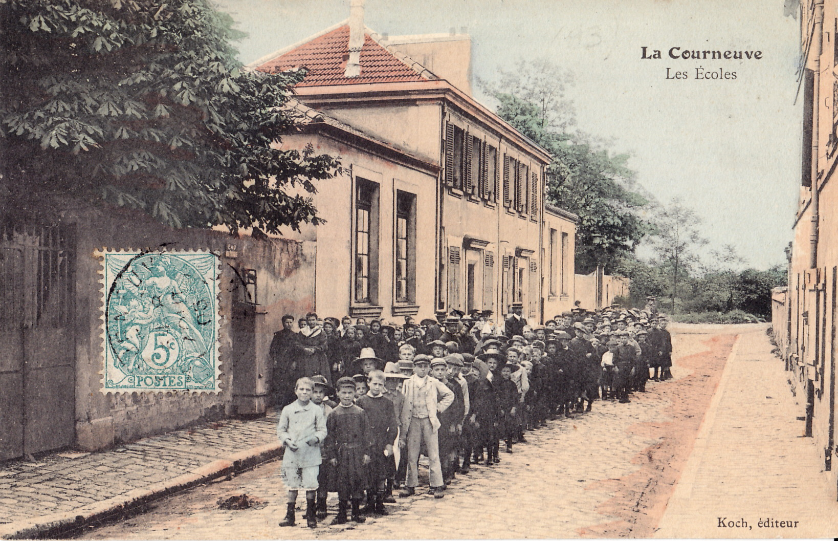 Carte postale ancienne éditée par Koch :LA COURNEUVE - Les écoles